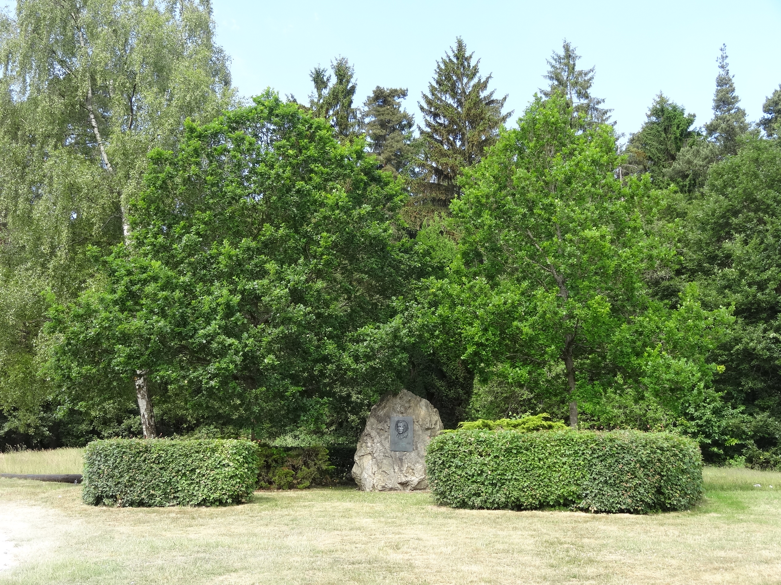 Weidigdenkmal (Butzbach)